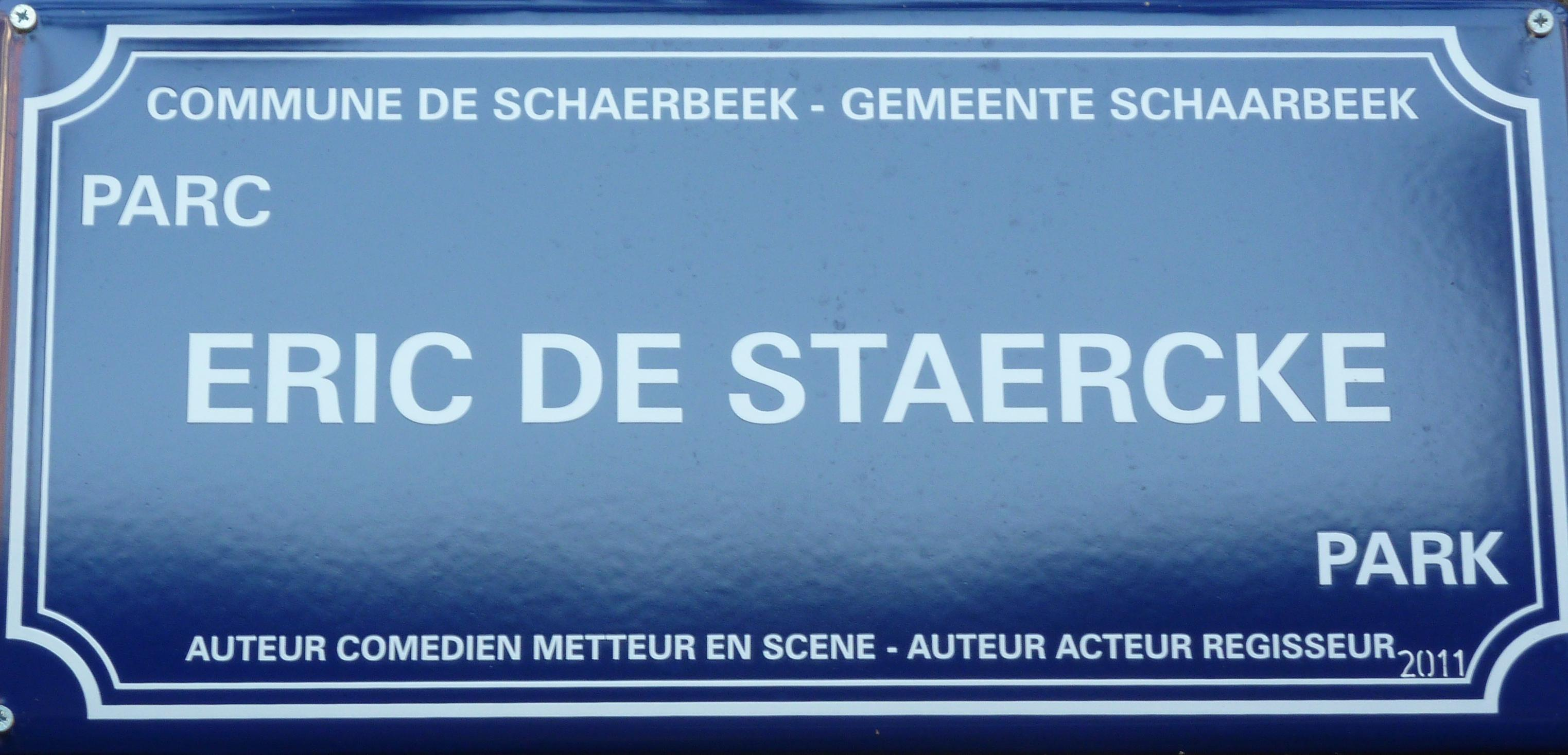 Le Mur des Célébrités à la Maison des Arts de Schaerbeek, Bruxelles, Belgique.